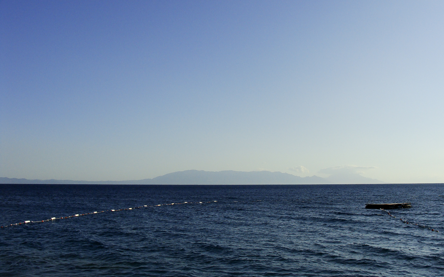 Izmir, Türkei